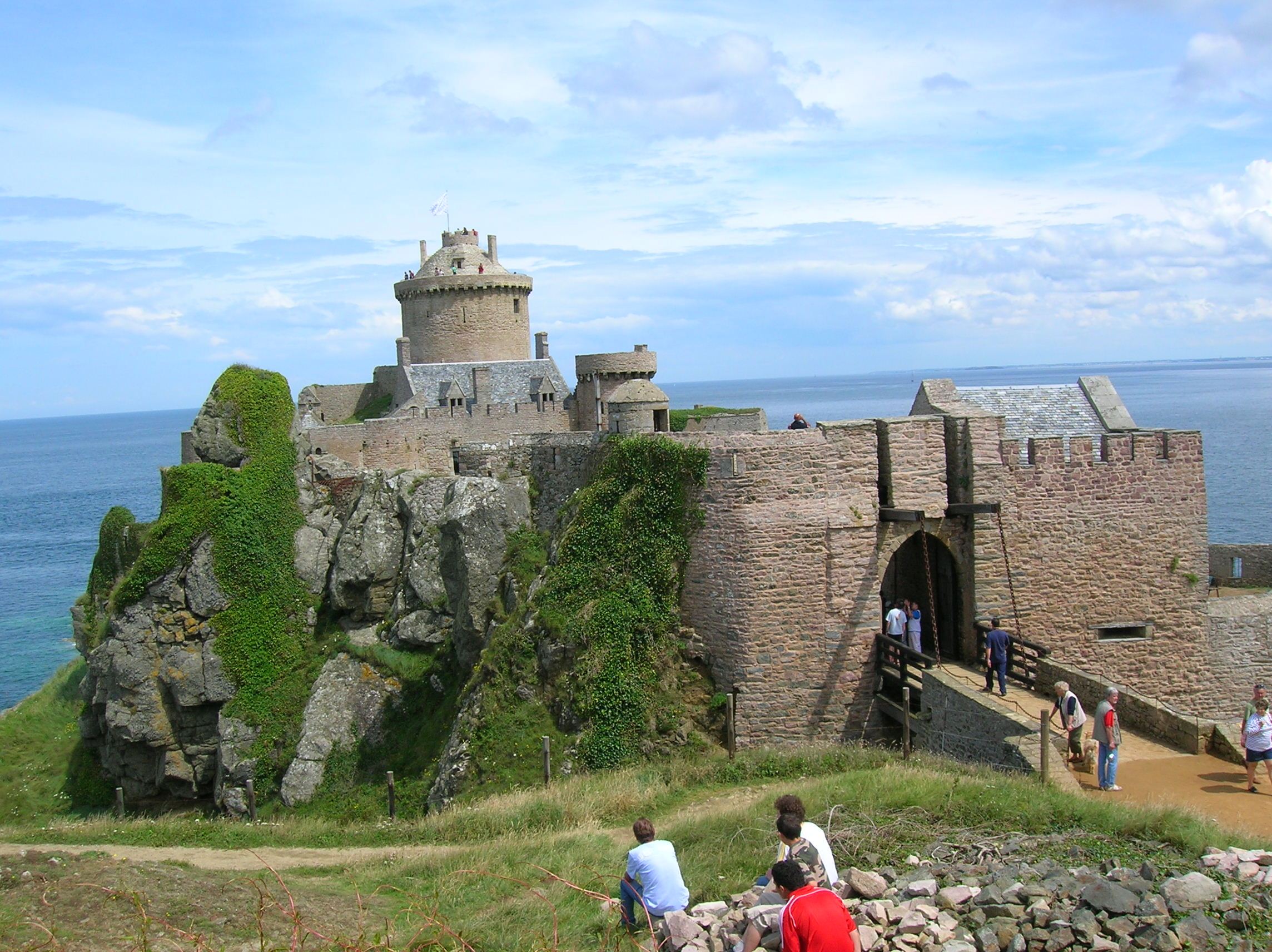 Fort La Latte, Côtes d'Armor, France